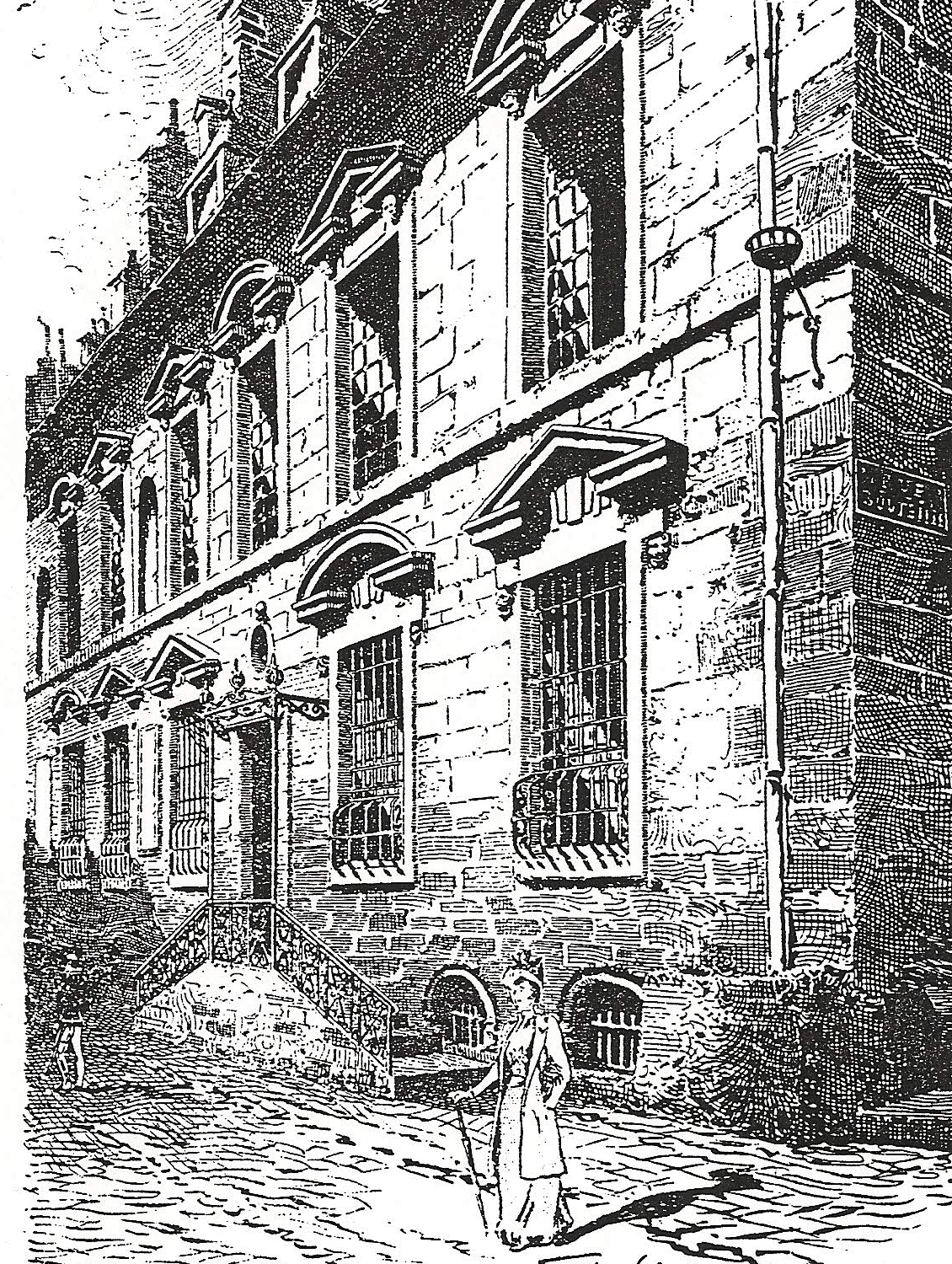 Hôtel du Bouteiller (Besançon) 1905